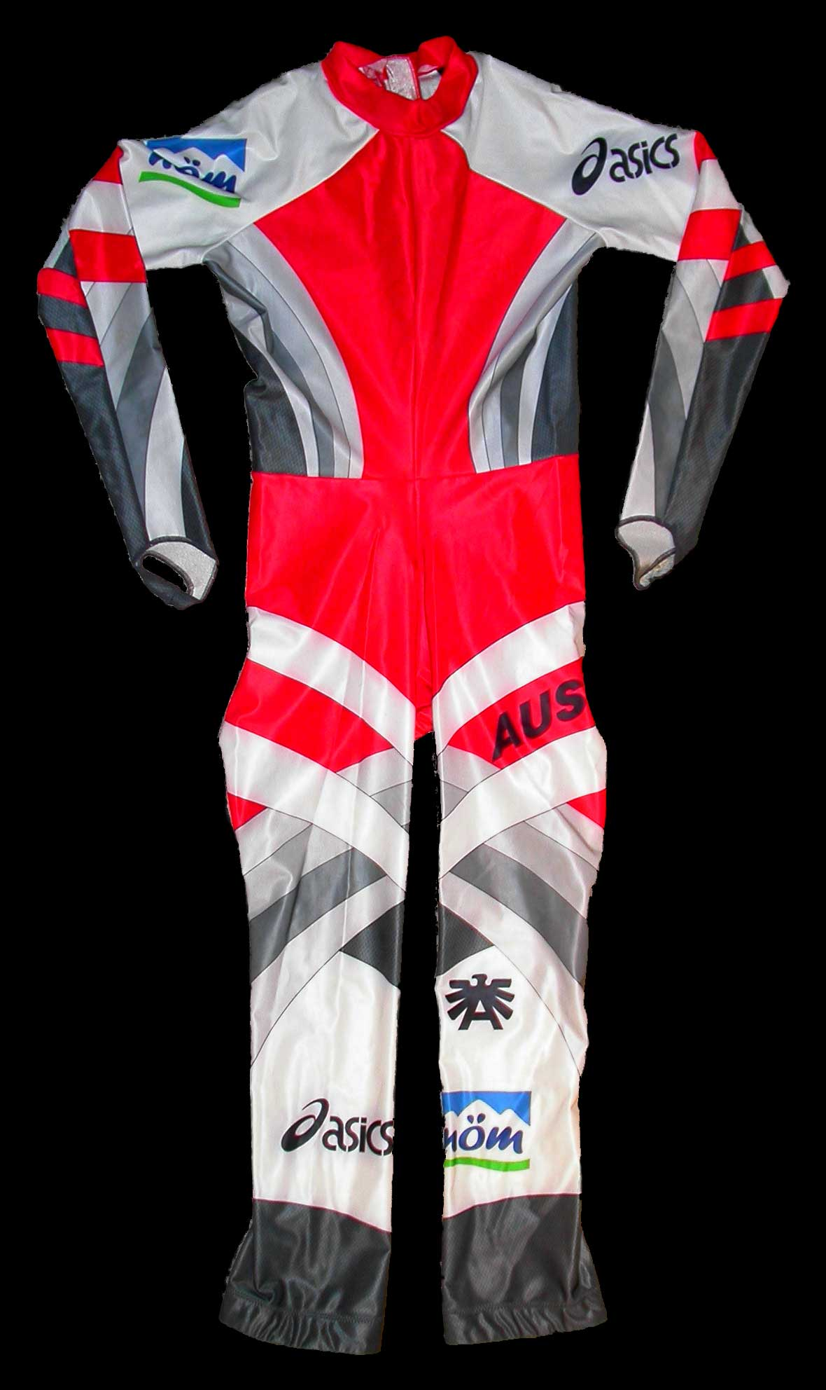 Didi's Racing Suit